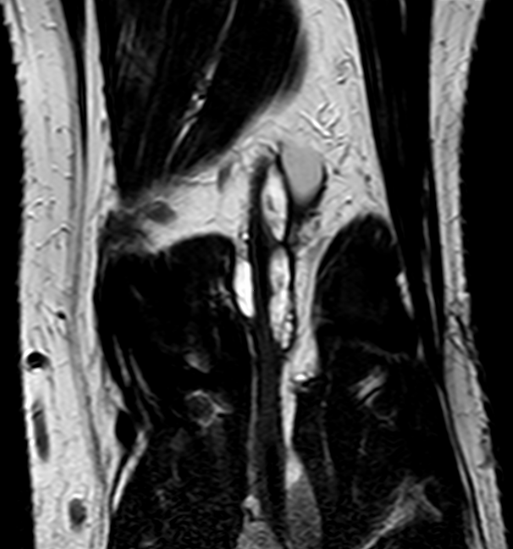 Zystische Adventitiadegeneration der Arteria poplitea bei einem sonst gefäßgesunden Mann um die 40. Es traten subakut rezidivierende Durchblutungsstörungen auf. MRT coronar T2w. Die Arteria mit mehreren länglichen T2-hellen Zysten eingeengt.